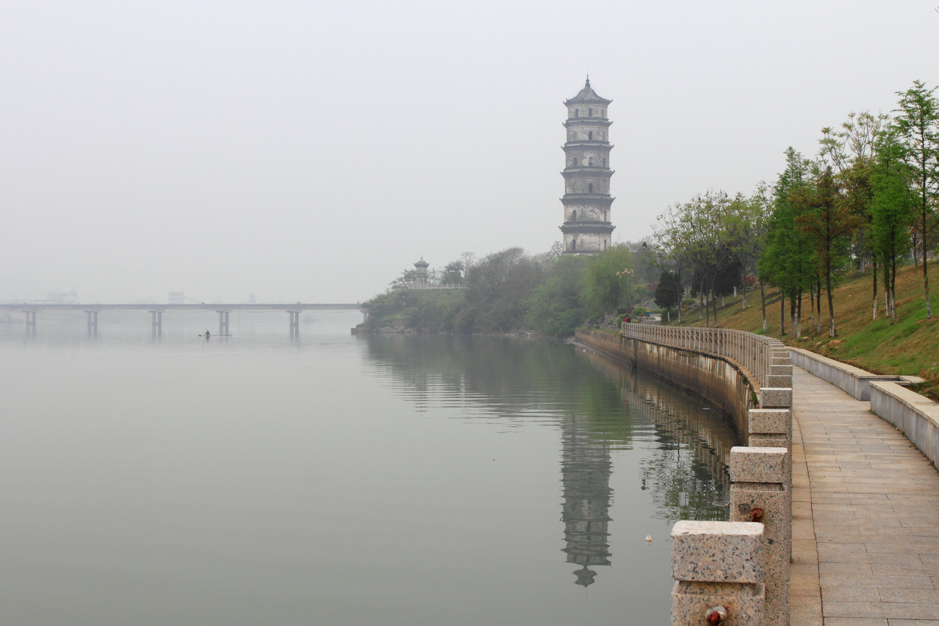 奎文塔，位于江西省上饶市信江北岸，上饶市文物保护单位。